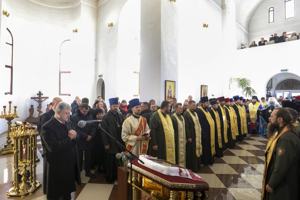 Капелани УПЦ КП моляться за полонених моряків